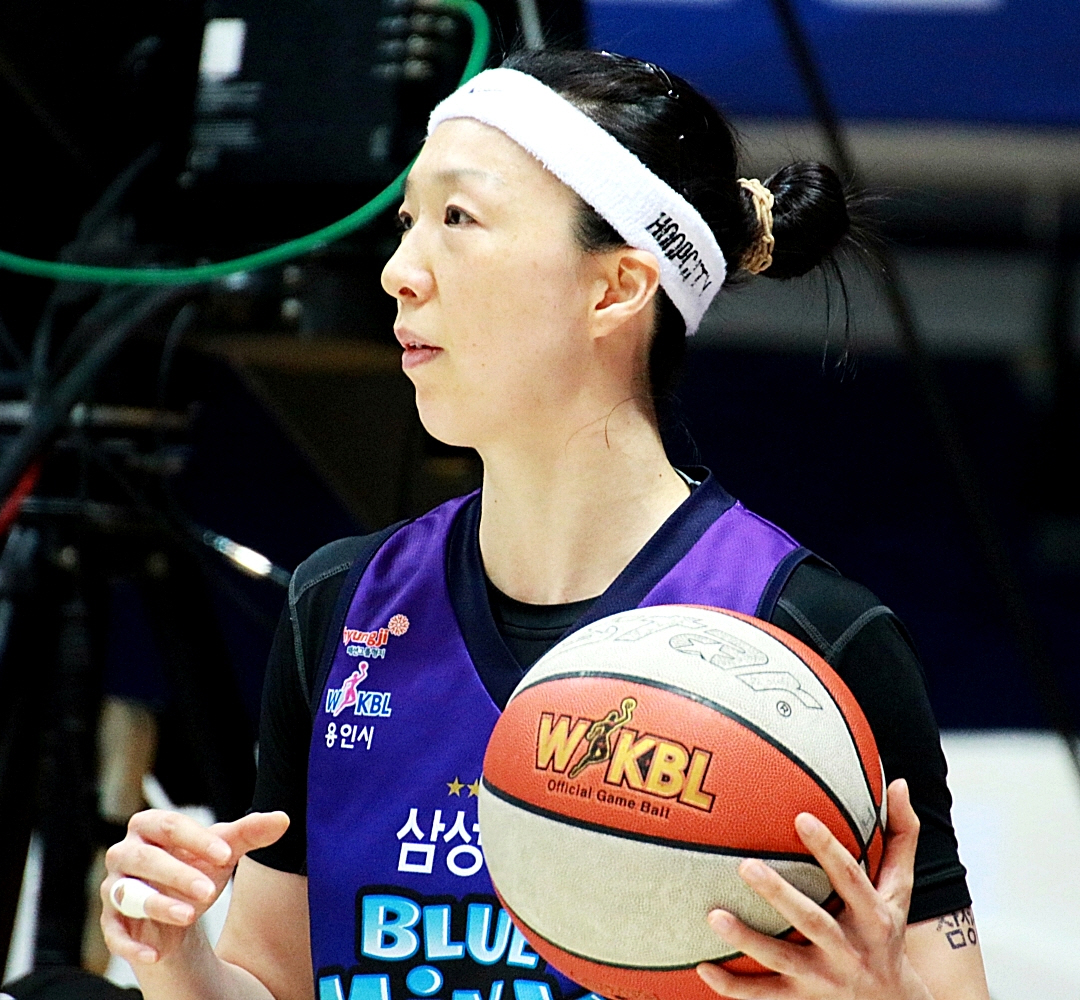 160110 여자농구 신한은행 vs 삼성생명 직찍 2